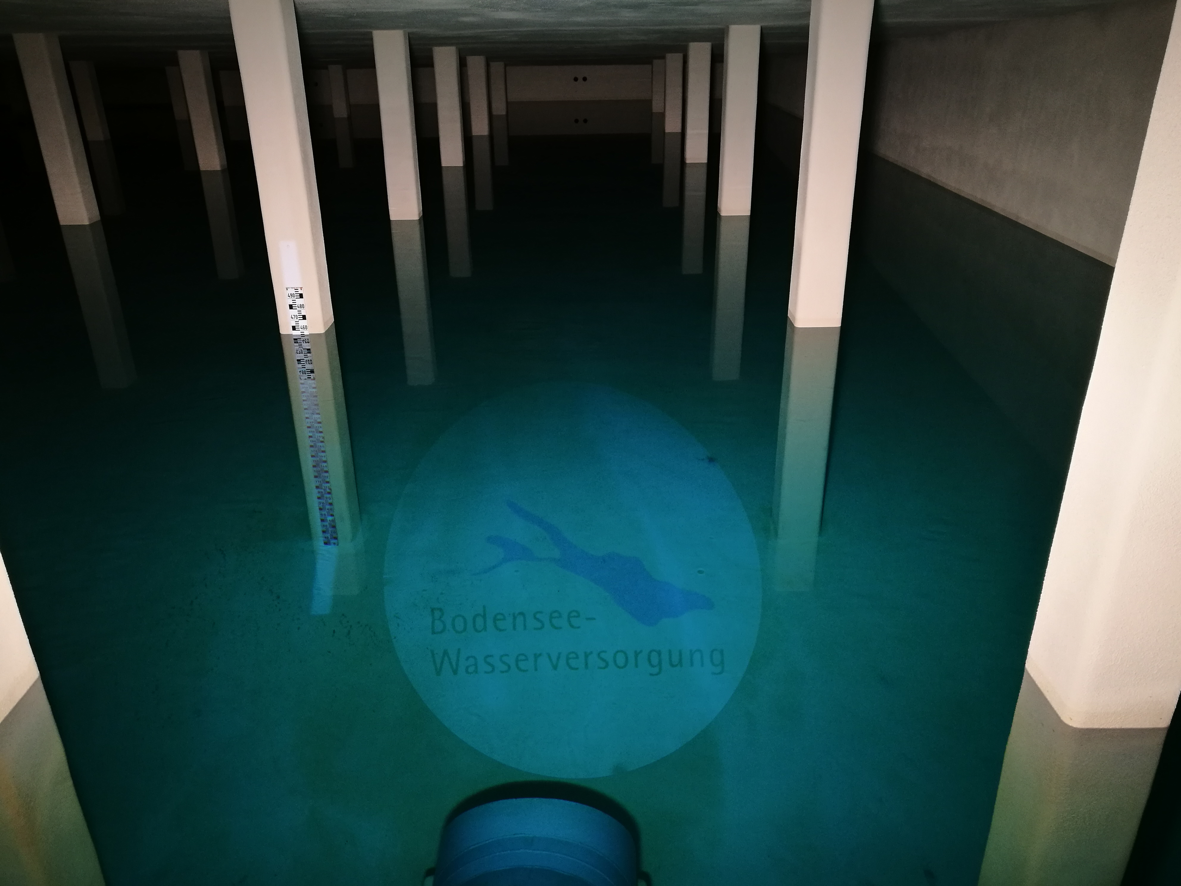 Deutschland (D) - Baden-Württemberg (BW) - Bodenseekreis (FN) - Überlingen: Bodensee-Wasserversorgung (BWV) - Speicherbecken